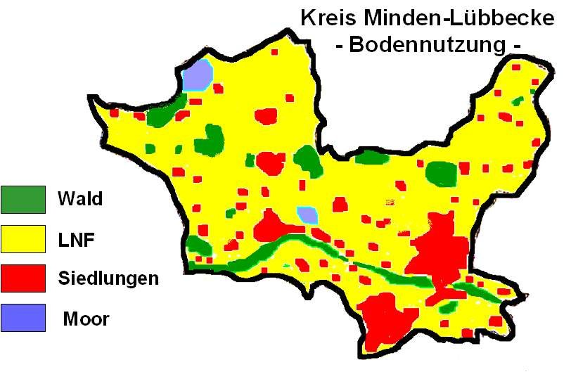 erstellt durch Benutzer Falk Oberdorf zur freien Verwendung (Ersteller wurde auf seiner Diskussionsseite darauf hingewiesen)